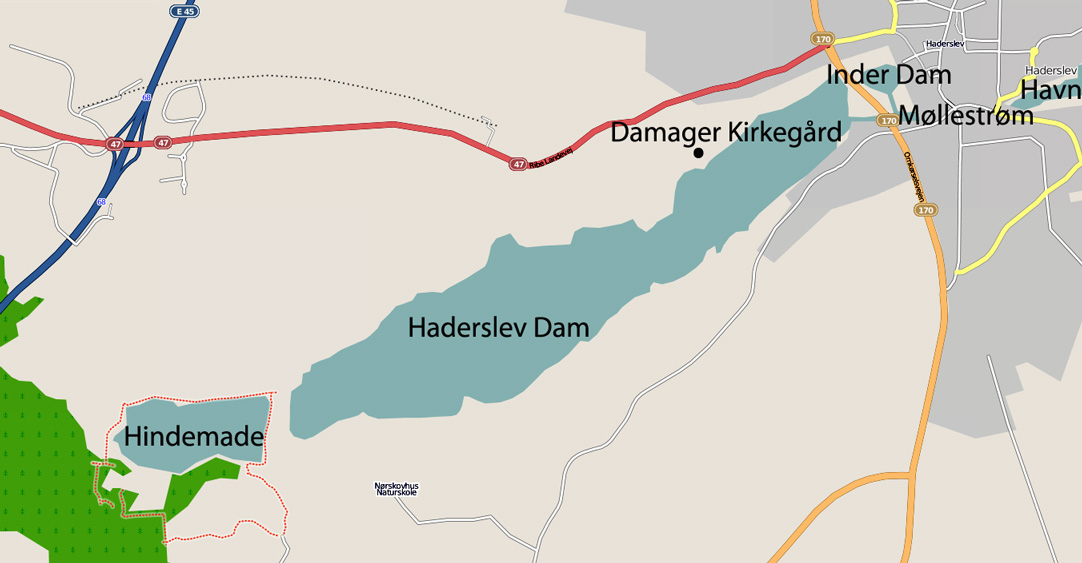 Lake Haderslev, Haderslev, Denmark